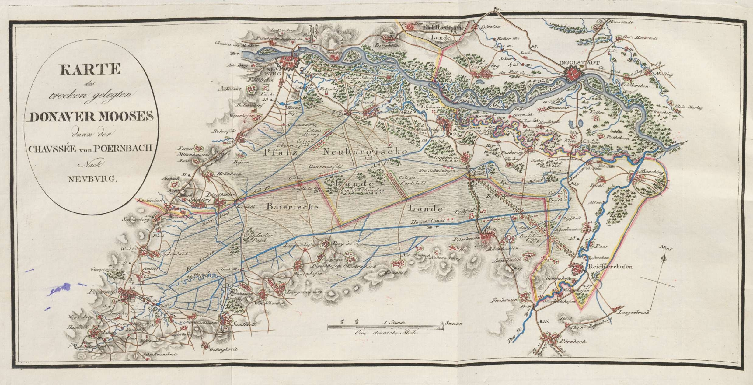 Karte des Donaumooses bei Schrobenhausen, Karte des trocken gelegten Donauer Mooses dann der Chaussée Poernbach nach Neuburg